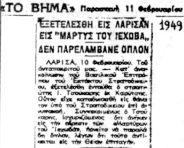 Informacja prasowa o wykonaniu wyroku śmierci na Johnie Tsoukarisie za odmowę podjęcia służby wojskowej (gazeta "Το Βήμα" 11 lutego 1949) "LARISSA , 10 lutego . Od naszego reportera. Komisarz Nadzwyczajnego Trybunału Wojskowego, poinformował o wykonaniu wyroku śmierci na żołnierzu J. Tsoukarisie z Karytsas. Ten człowiek został skazany na śmierć przez Sąd Wojskowy za niesubordynację. Tsoukaris uczestnicząc w herezji " Świadków Jehowy " odmówił wzięcia broni do ręki, twierdząc, że byłoby to sprzeczne z przykazaniami Bożymi".